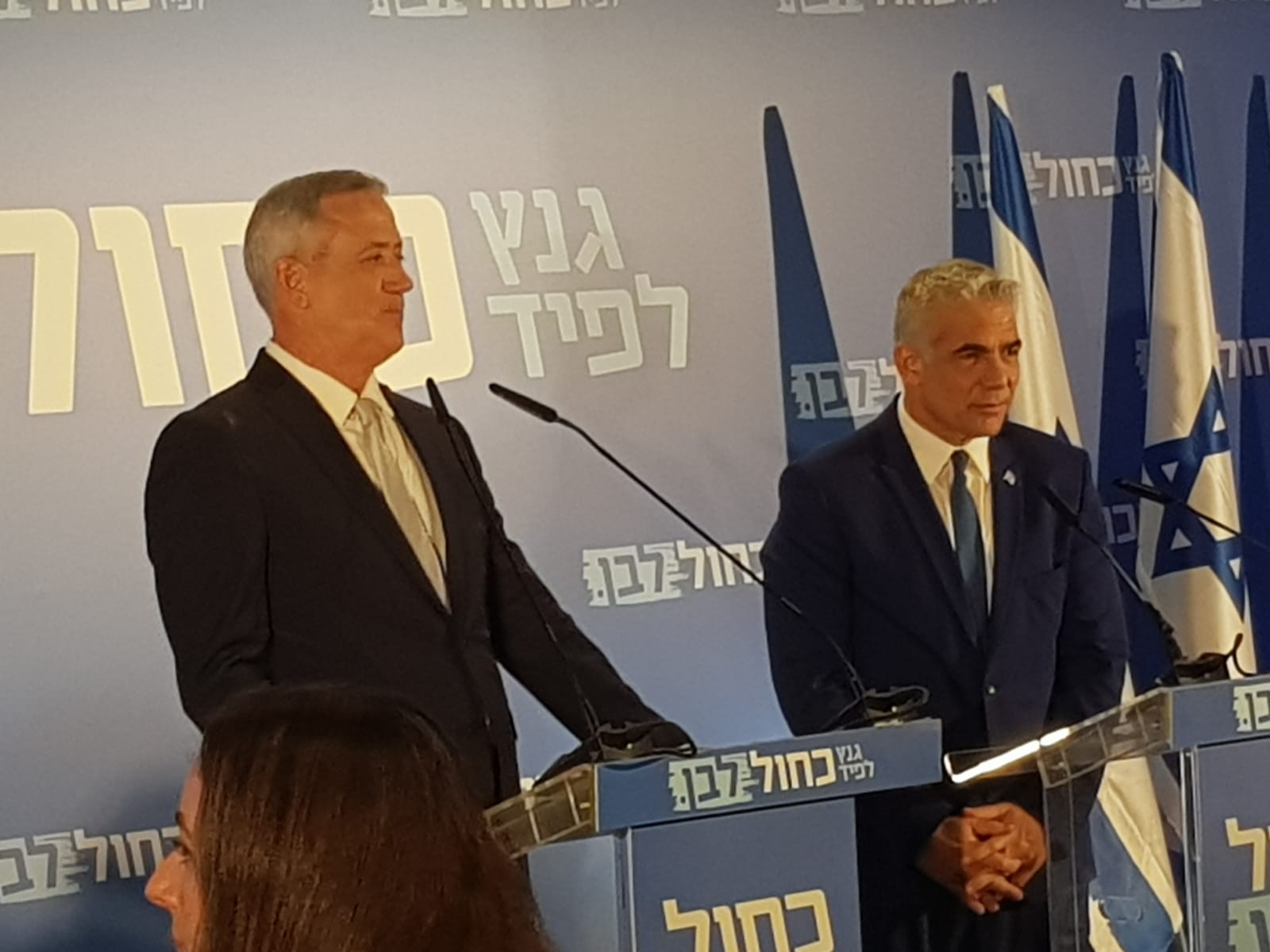 מסיבת עיתונאים, מפלגת כחול לבן, יאיר לפיד ובני גנץ